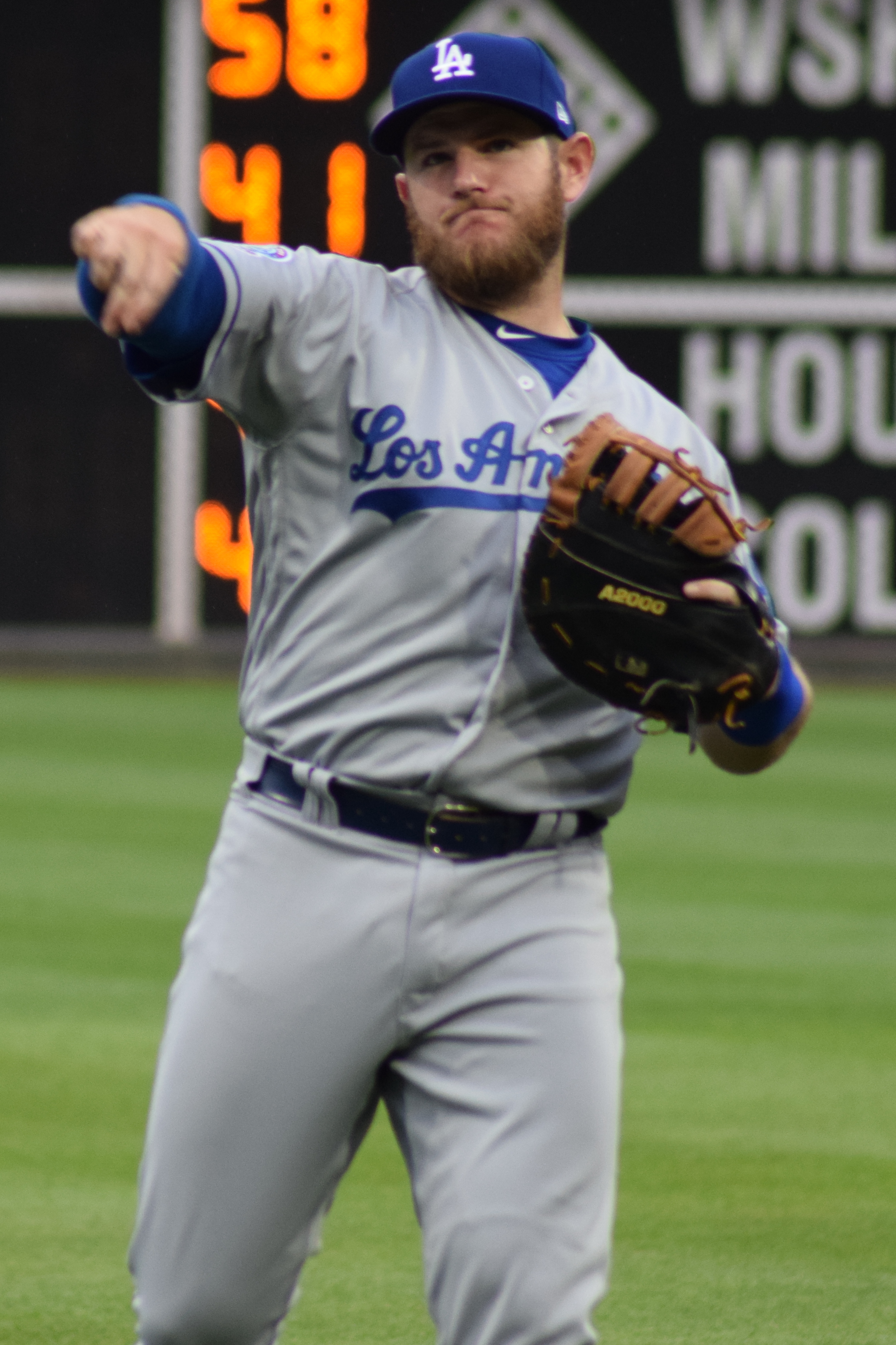 Max Muncy